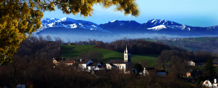 Vue du village d'Aubertin avec les Pyrénées en toile de fond